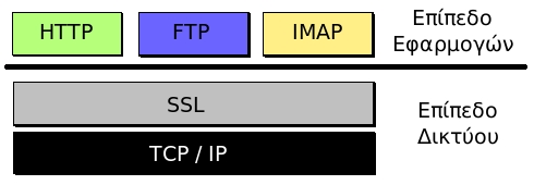 Το SSL λειτουργεί πριν το TCP/IP και μετά τις εφαρμογές υψηλού επιπέδου Άδεια χρήσης Το παραπάνω αρχείο διανέμεται υπό τις δύο παρακάτω άδειες χρήσης. Μπορείτε να επιλέξετε την άδεια της προτίμησής σας.